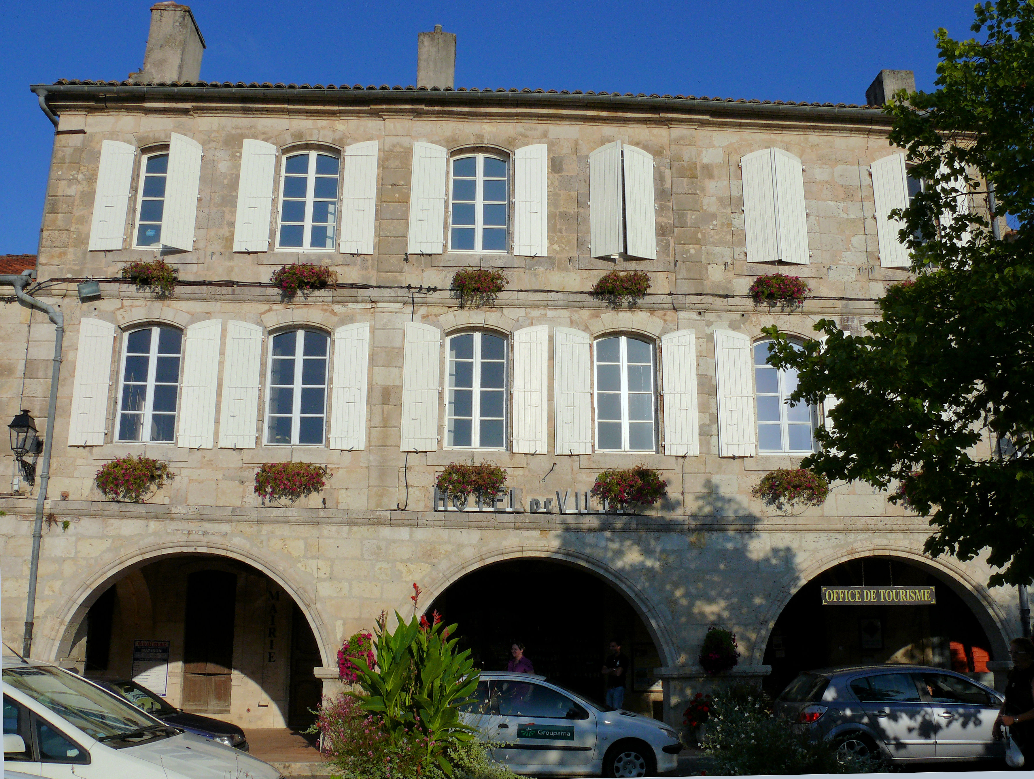 Montréal (Gers) - Hôtel de ville